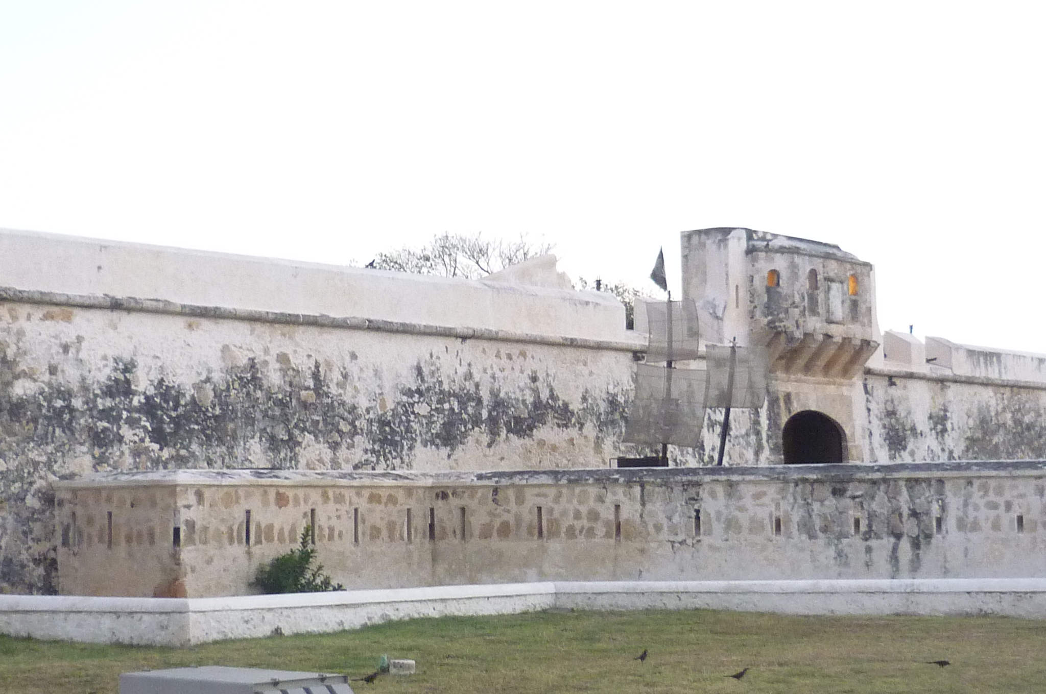 Puerta de Tierra en Campeche